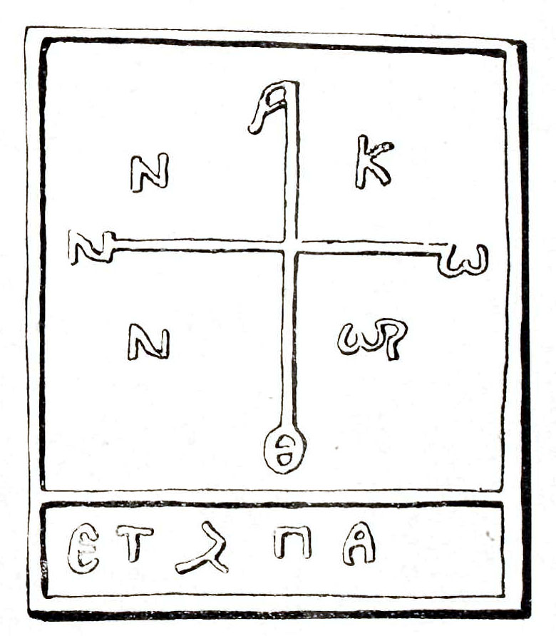 Επιγραφή Νικάνορος στην μονή Οσίου Μελετίου από το άρθρο « Η μονή του οσίου Μελετίου και ο Μητροπολίτητης Αθηνών Νικάνωρ» του Κ. Κωνσταντόπουλου